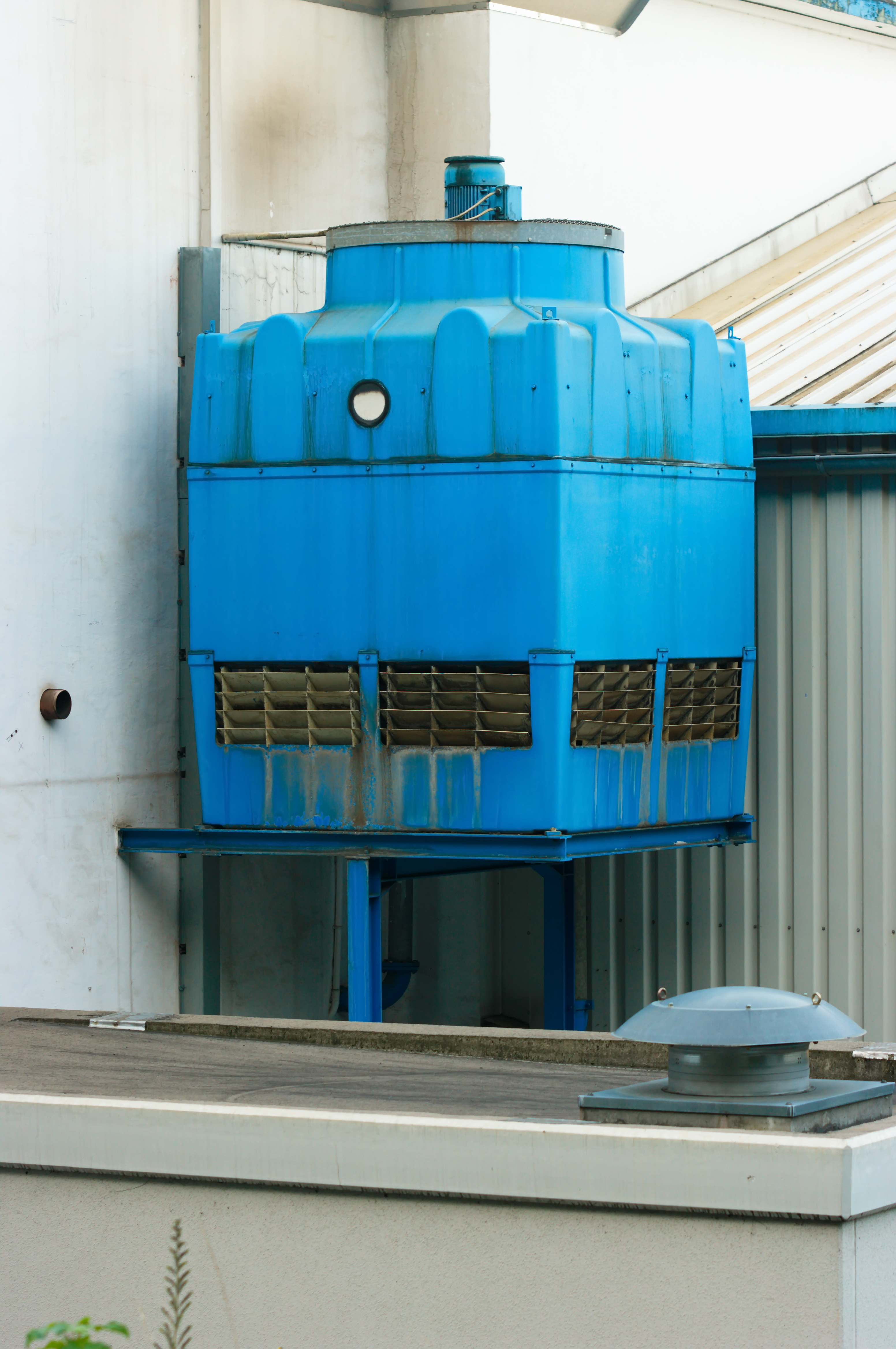 Rückkühlwerk der Esserwerke im Westertal (Warstein).